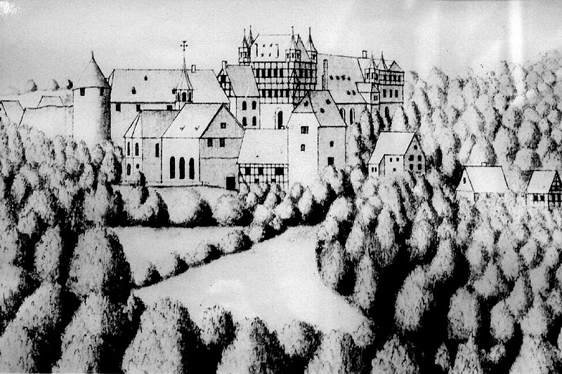 Eine der ältesten Ansichten der ursprünglichen Burg an der Wupper; idealisierte Ansicht der Burg auf einer Zeichnung von Erich Philipp Ploennies